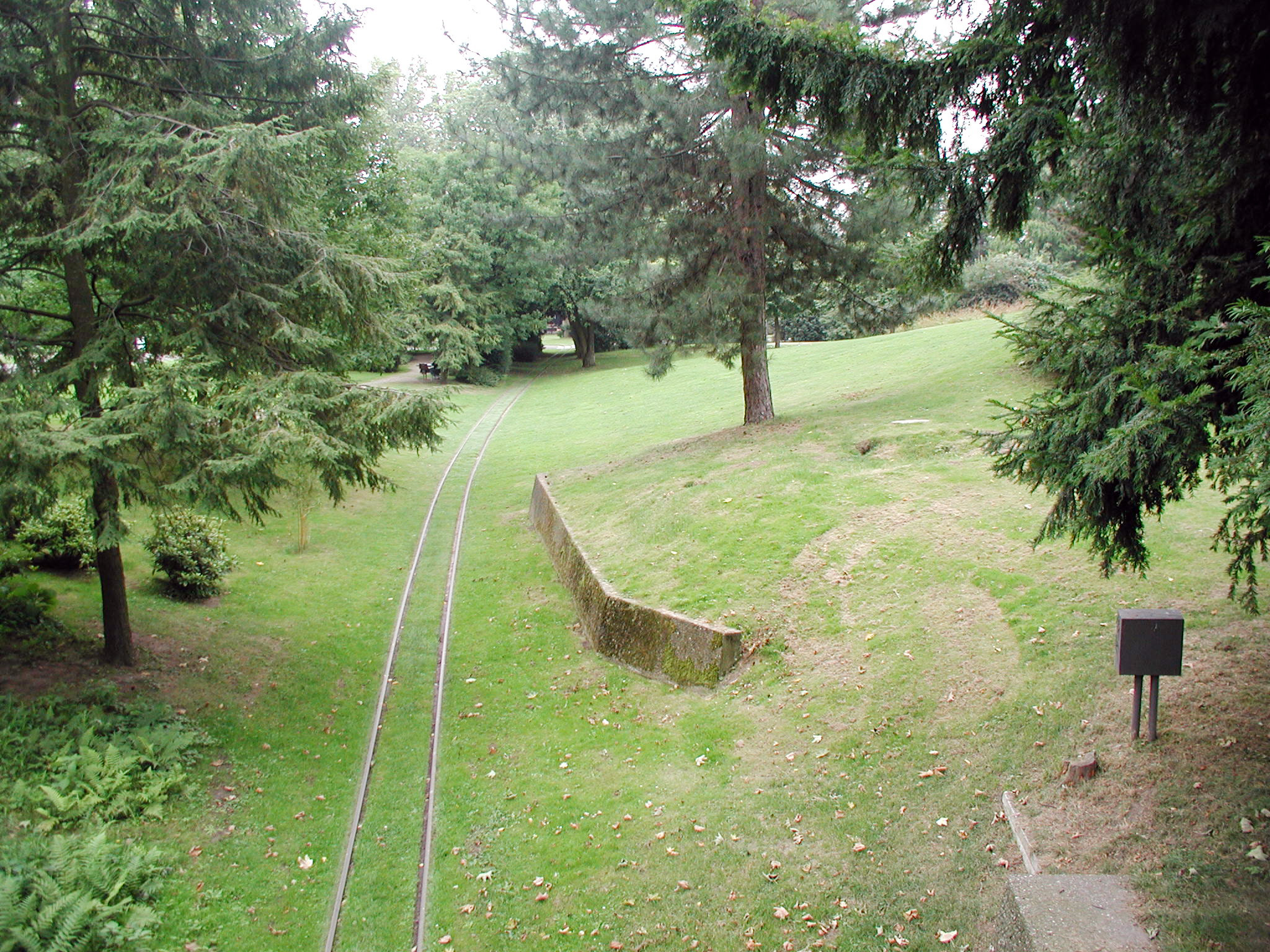 Köln, Rheinpark ehemaliger Wallgraben